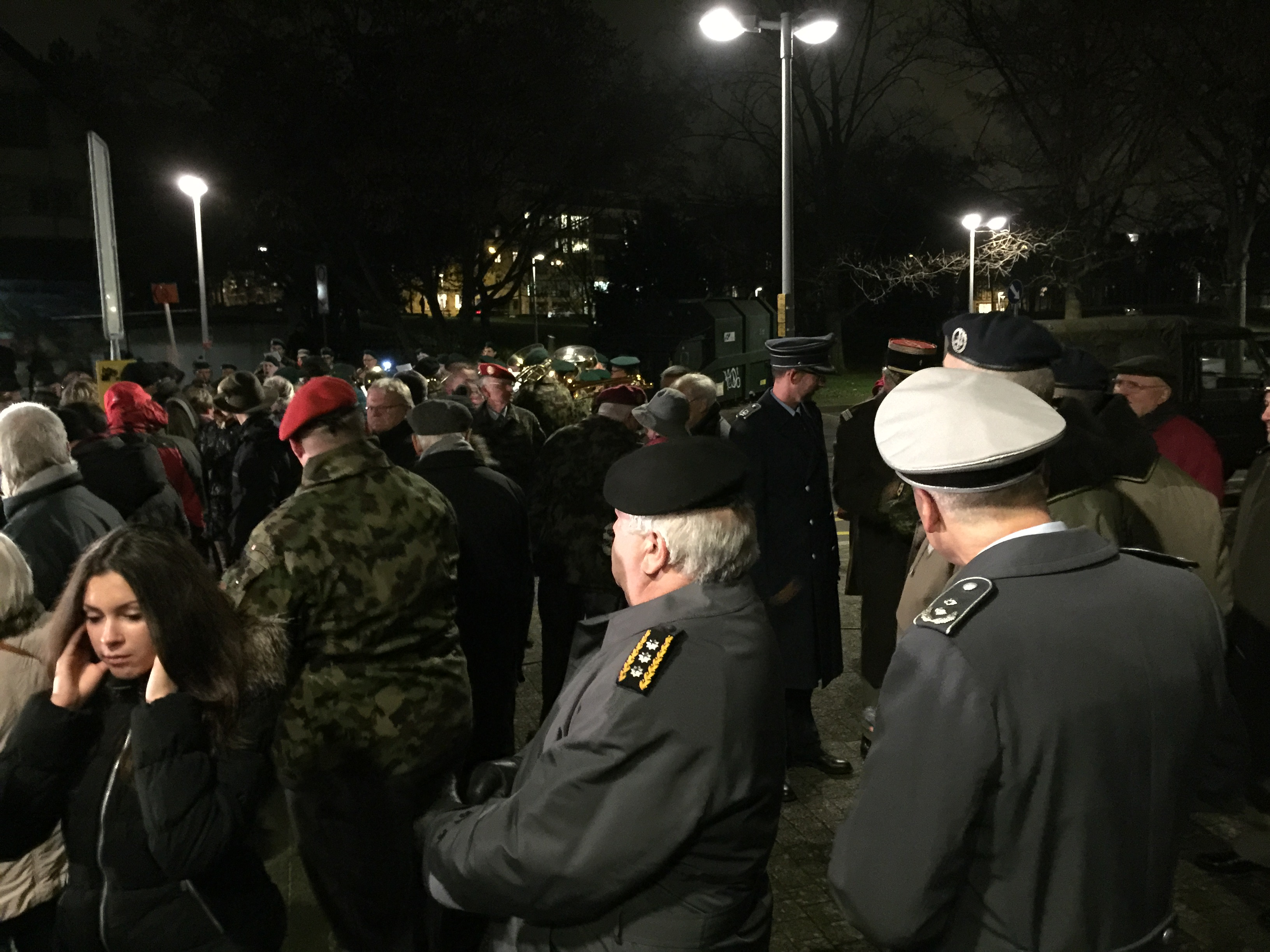 barbarasalut nenne die das